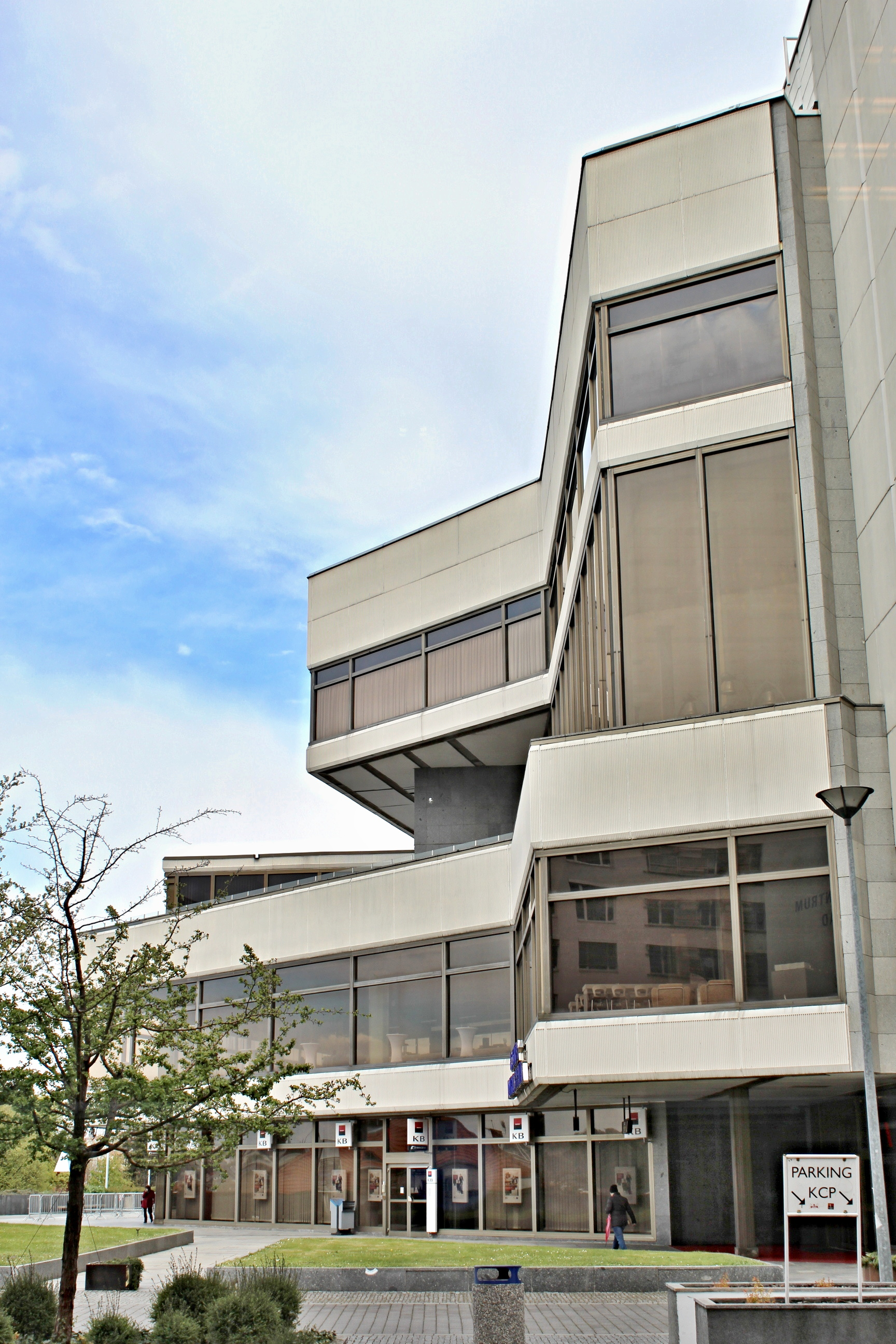 Vyšehrad Kongresové centrum